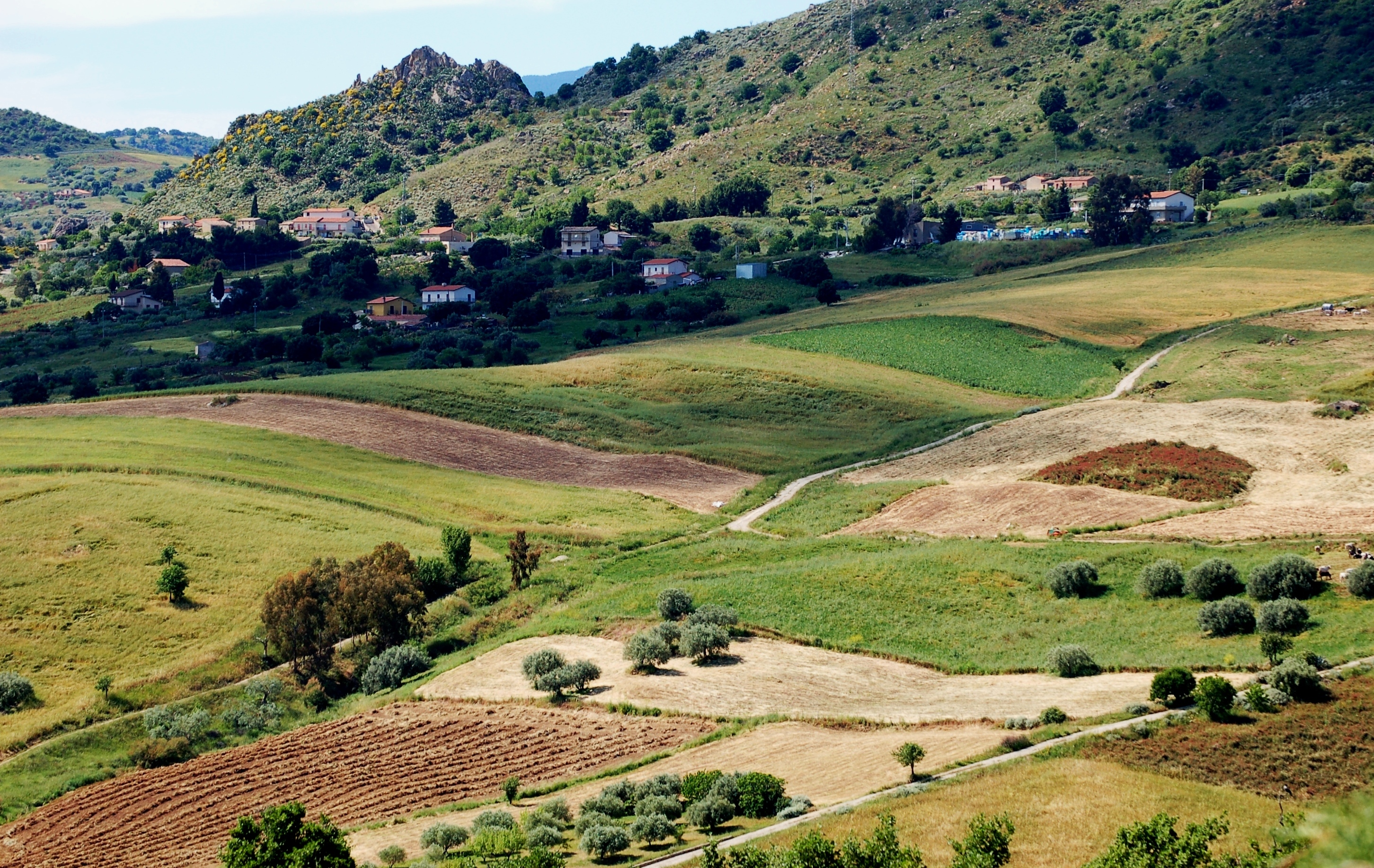 Nicosia (En), ITA